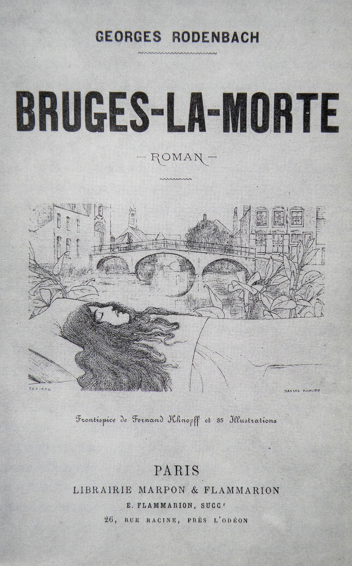 Frontispice de Fernand Khnopff pour l'édition princeps du roman Bruges-la-Morte de Georges Rodenbach (1892).